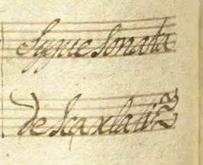 Attribution de la sonate K. Deest en ré majeur, du manuscrit Ronda de Madrid, pages 50.